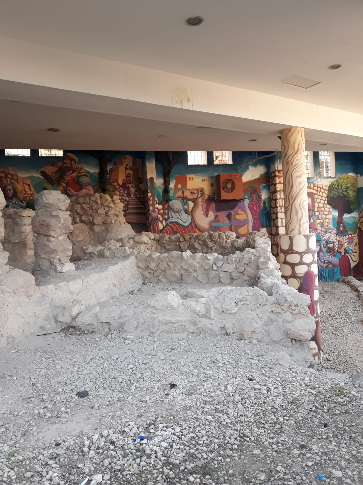 תל רומיידה - חפירות תל חברון: במרכז - בית מתקופת הברונזה הקדומה לפני 4500 שנה, שמאל - בית מתקופת חזקיהו מלך יהודה לפני 2700 שנה, למעלה - בית יהודי מהיום